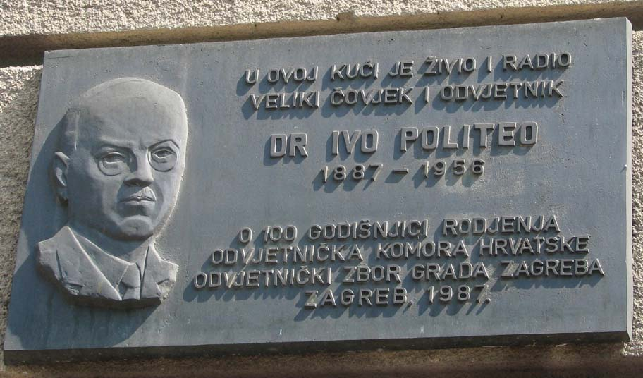 Spomen ploča dr. Ivi Politeu